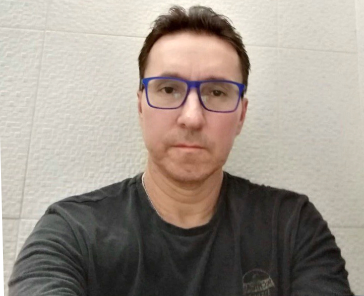 Juan Carlos Sanchez